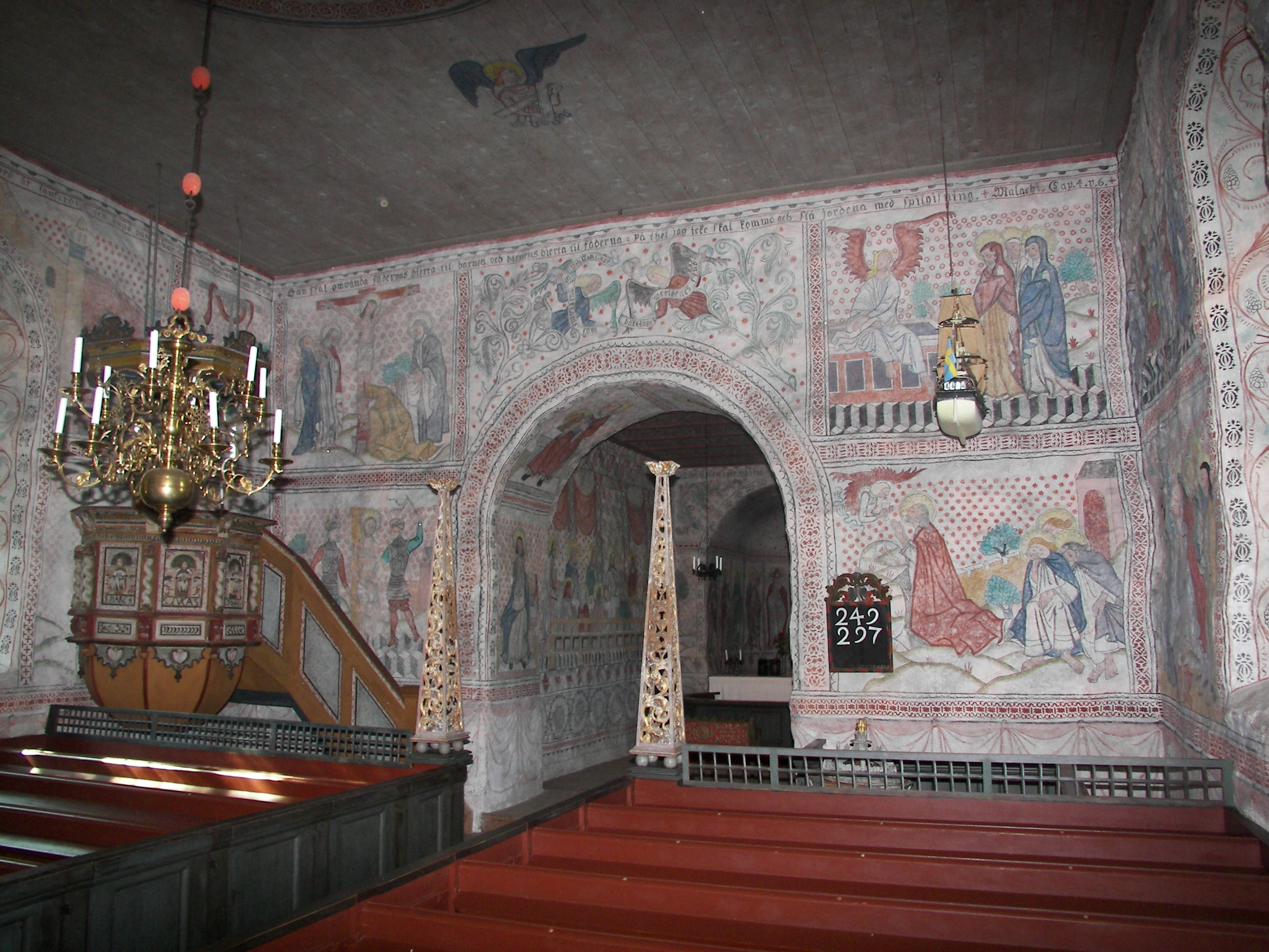 Murbergskyrkans interiör